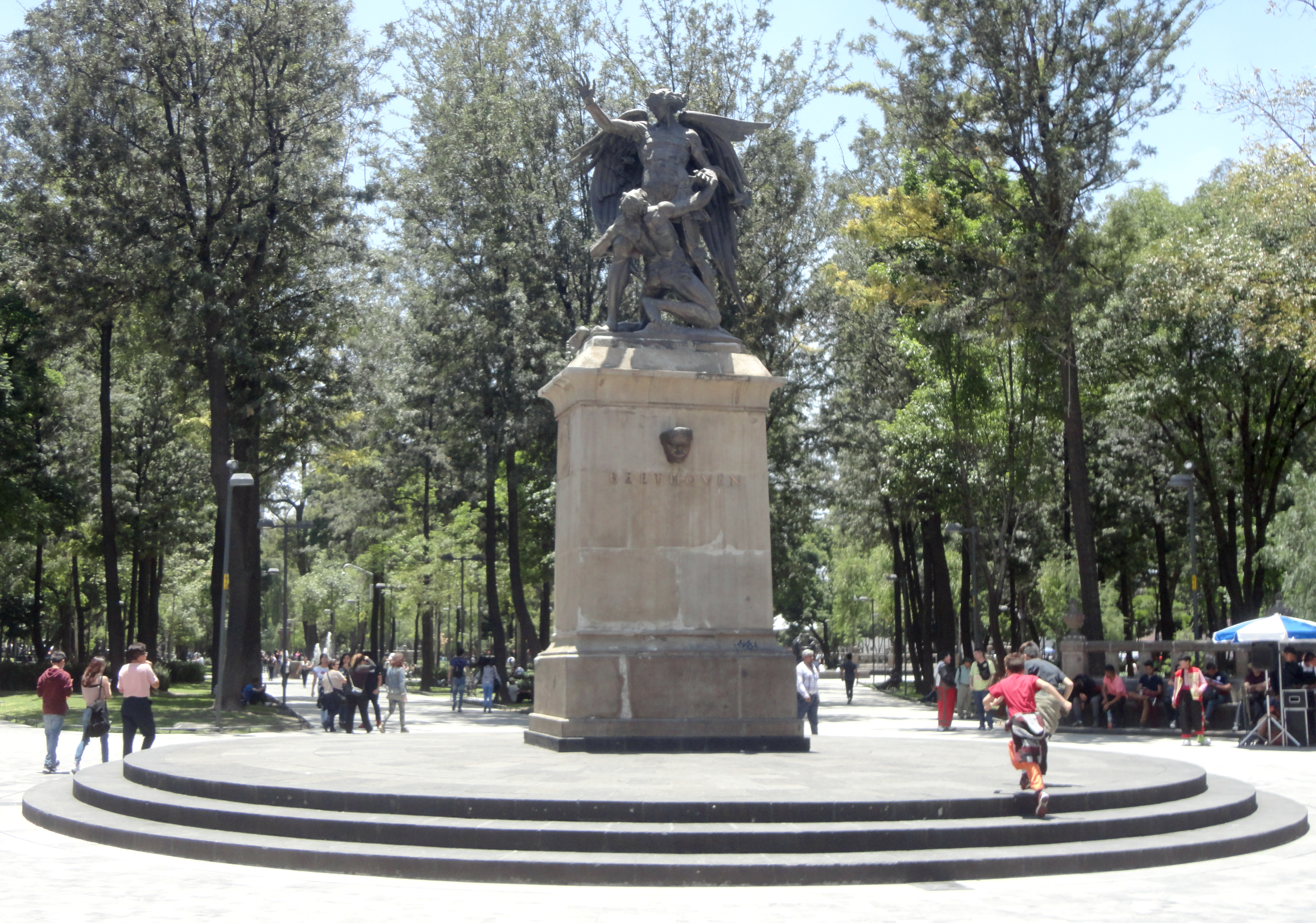 Monumento a Beethoven en la Alameda Central, Ciudad de México.